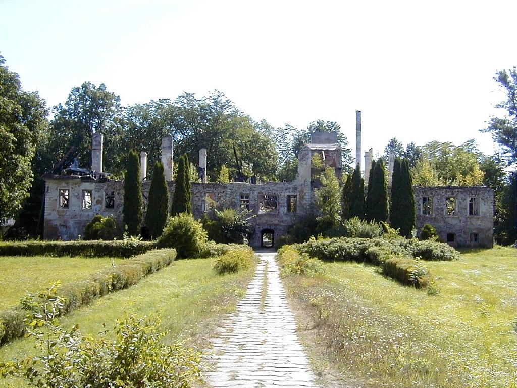 Rankas muižas pils drupas. 2002-08-10